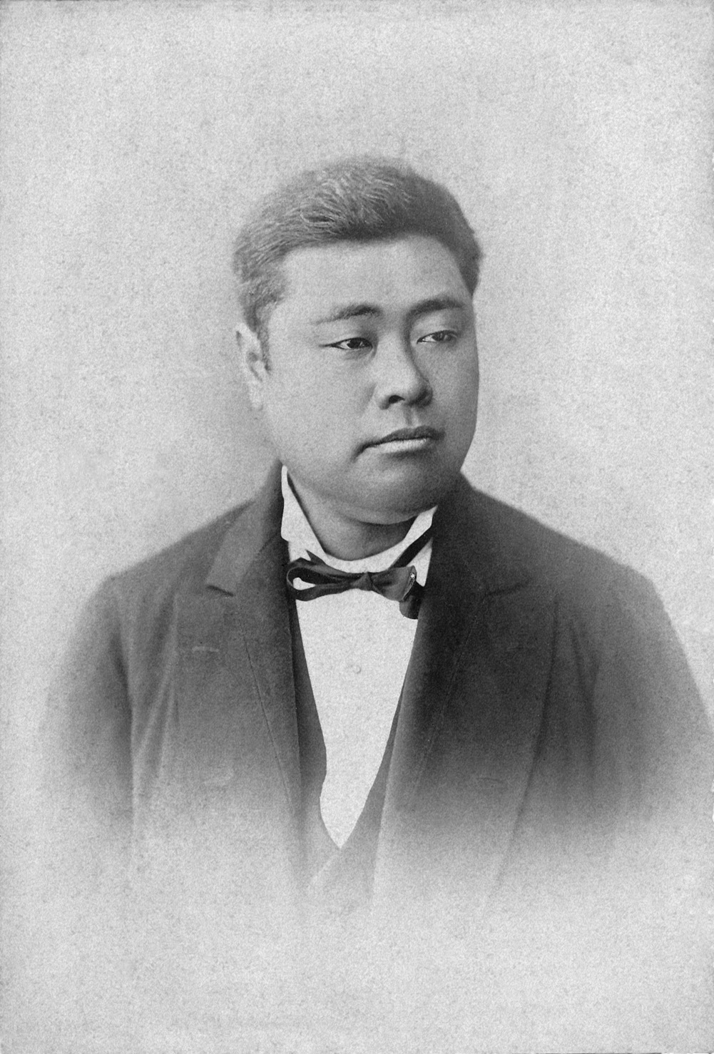 平野富二